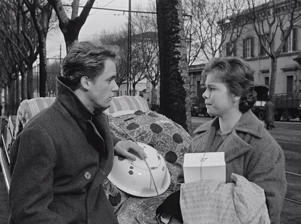 Screenshot dal film Il tetto (1956)